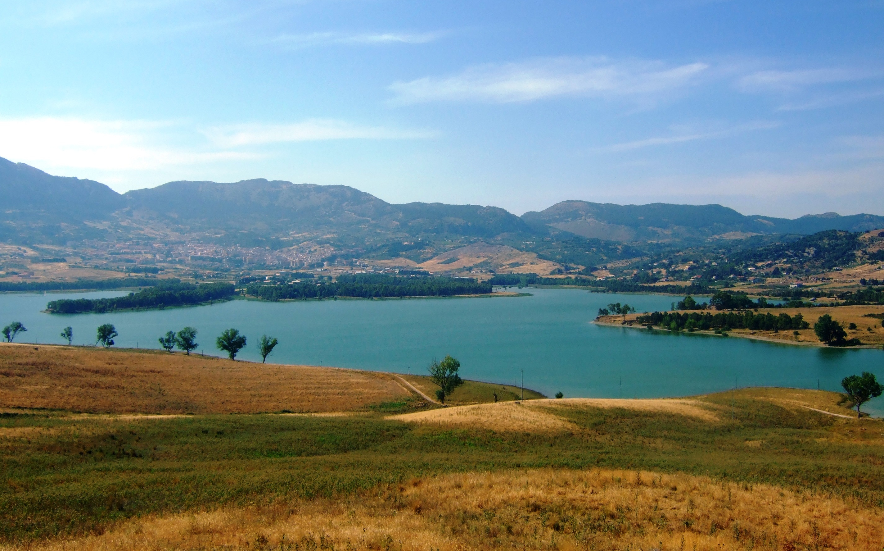 Il lago visto da sud (via Corleone)